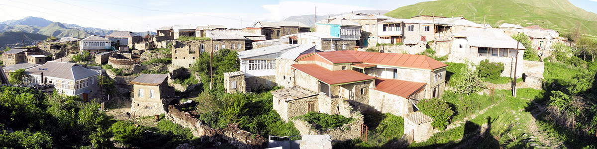 Хури, старая часть